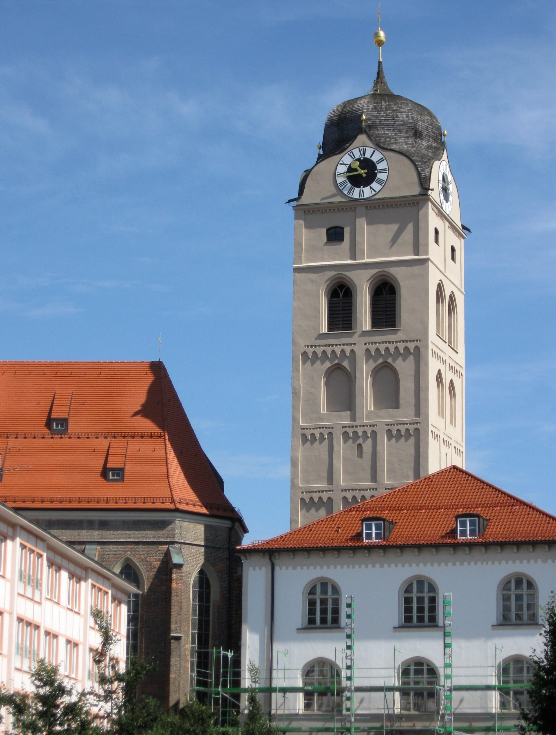 Schrannenplatz 1. Schrannenhalle, dreigeschossig, neugotisch, 1866, dahinter Glockenturm der Stadtpfarrkirche.